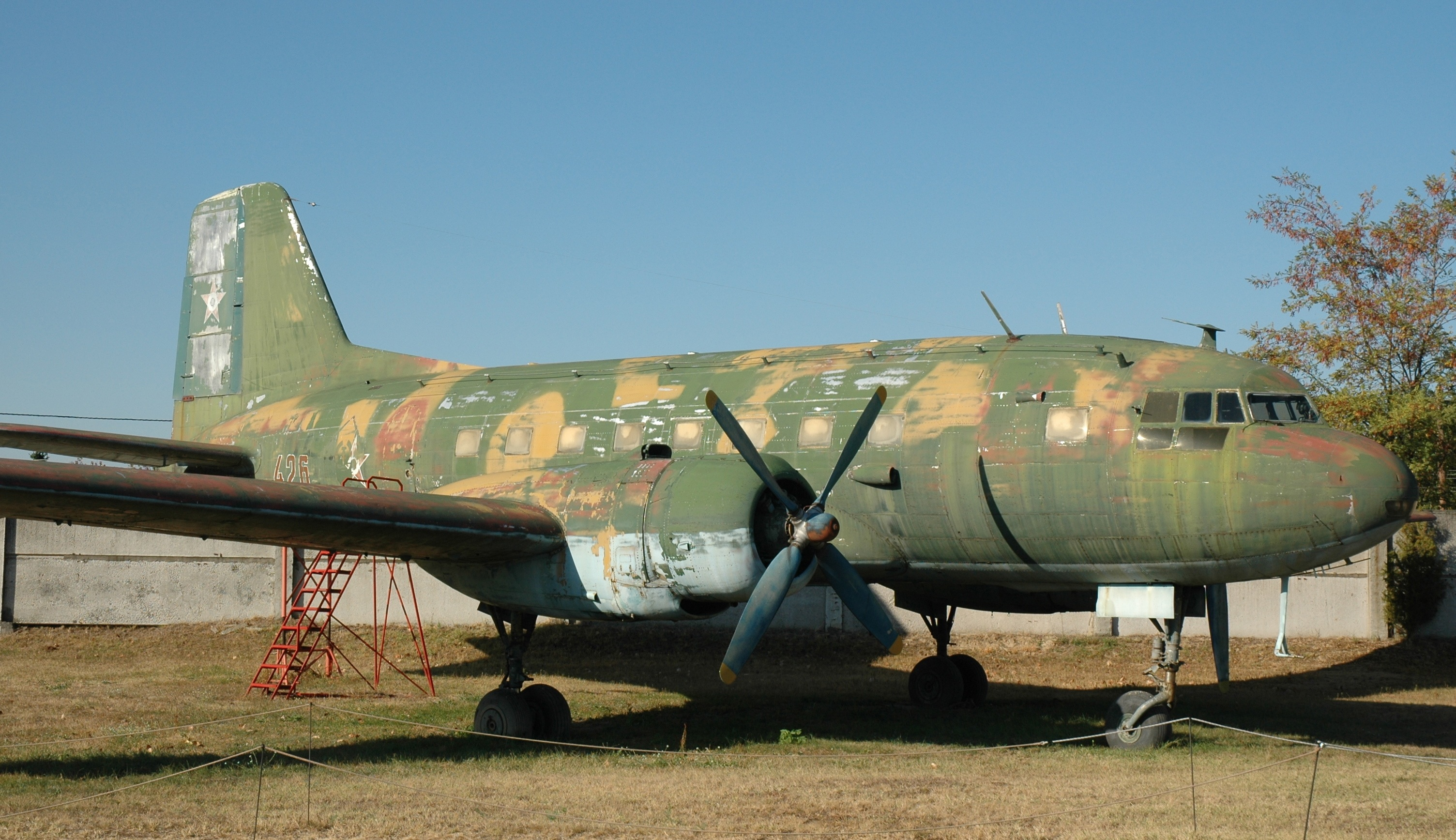 Ex-GDR Ilyushin Il-14P at the Museum of Hungarian Aviation in Szolnok